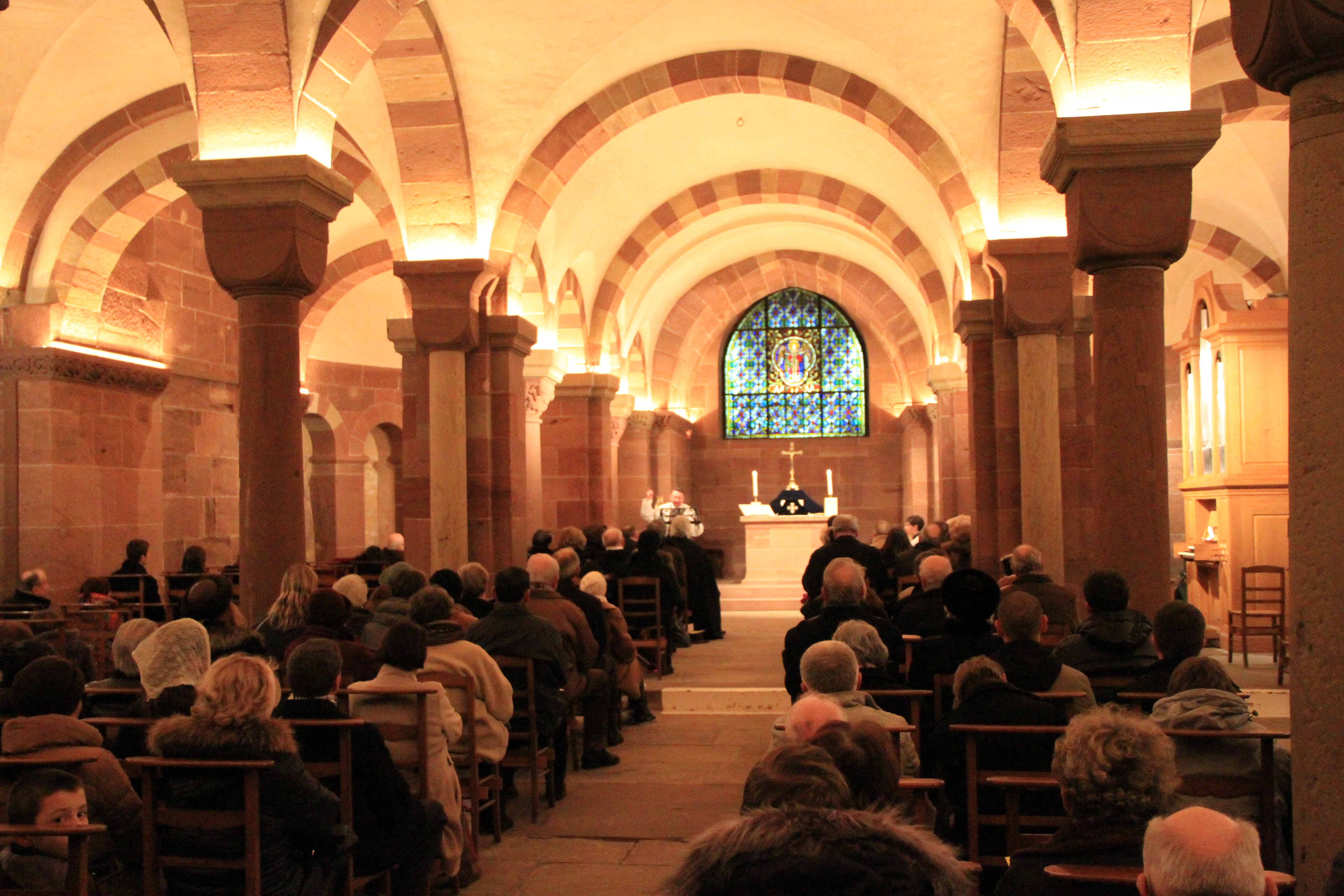 Strasbourg crypte de la cathédrale Notre Dame, messe de Requiem à la mémoire du roy Louis XVI et des martyrs de la Révolution française 19 janvier 2013